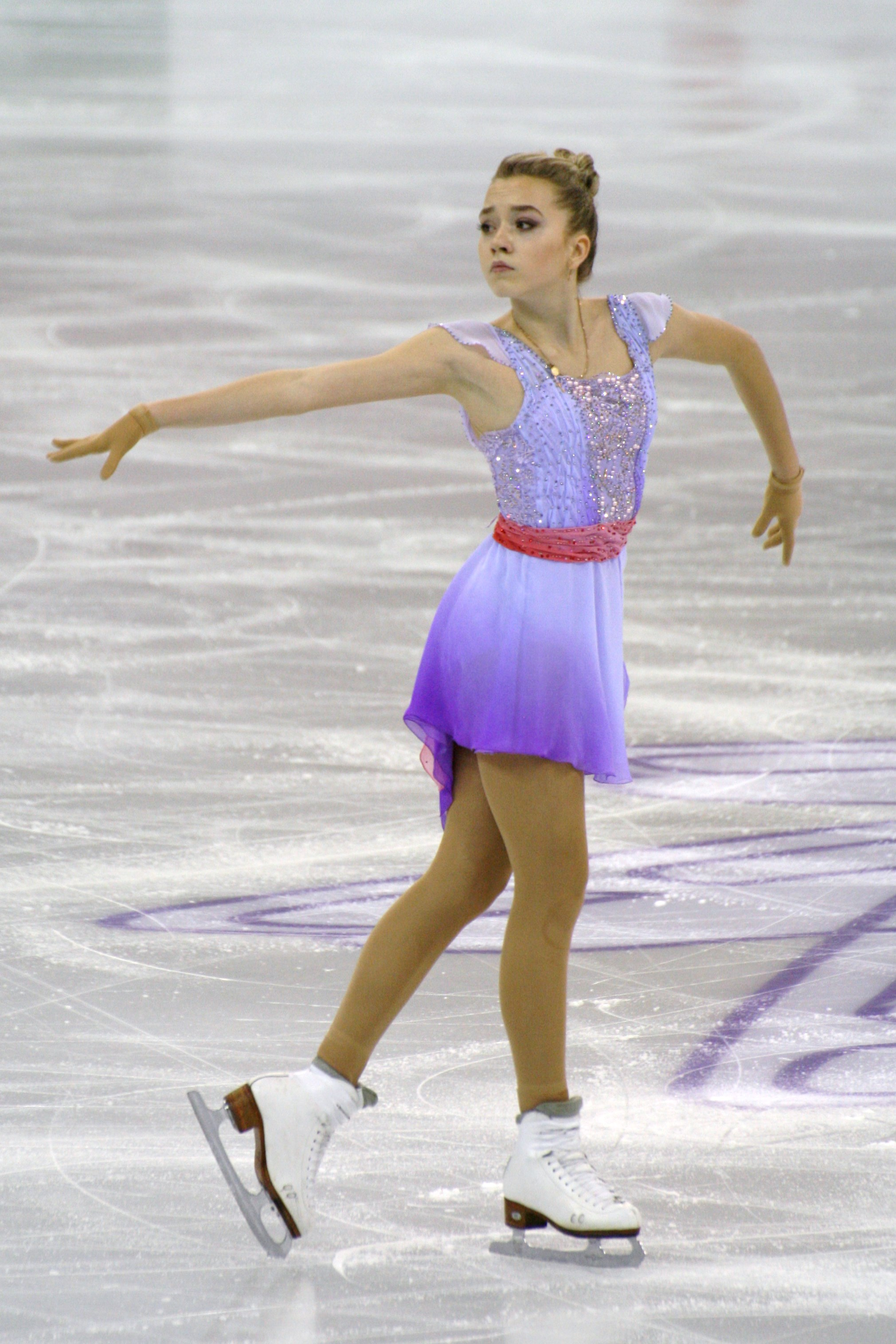 Елена Радионова (Россия) на финале Гран-при по фигурному катанию 2015-2016.